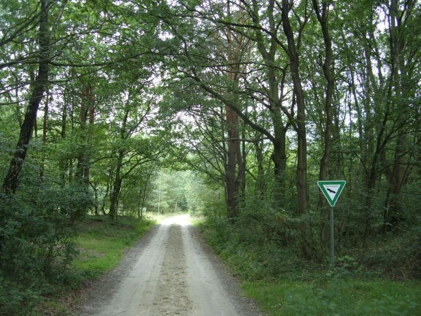 Naturschutzgebiet „Heide und Moor bei Haslah“, Niedersachsen